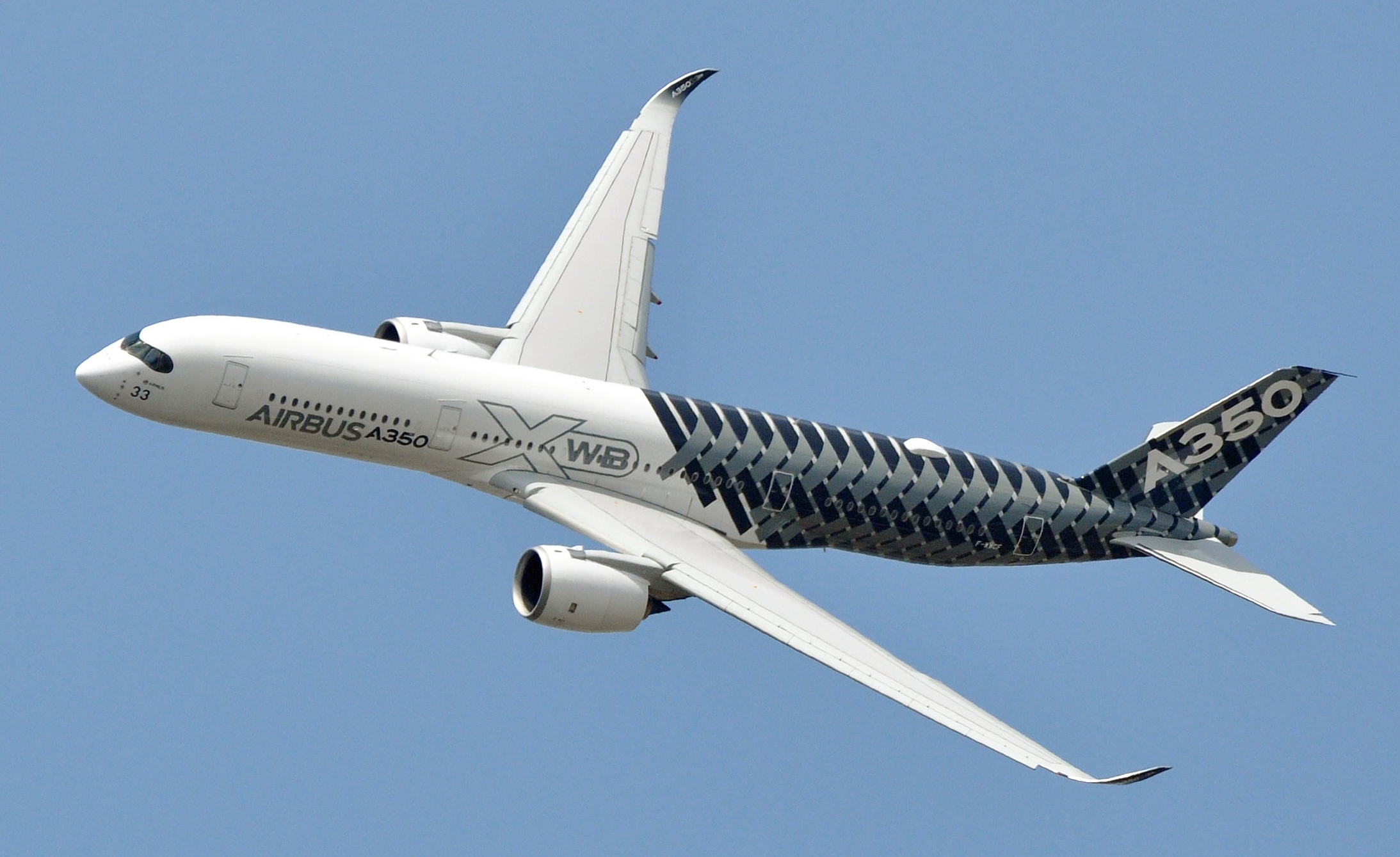 MSN 002 A350-941 AIRBUS INDUSTRIE LBG AIRPORT SIA 2015